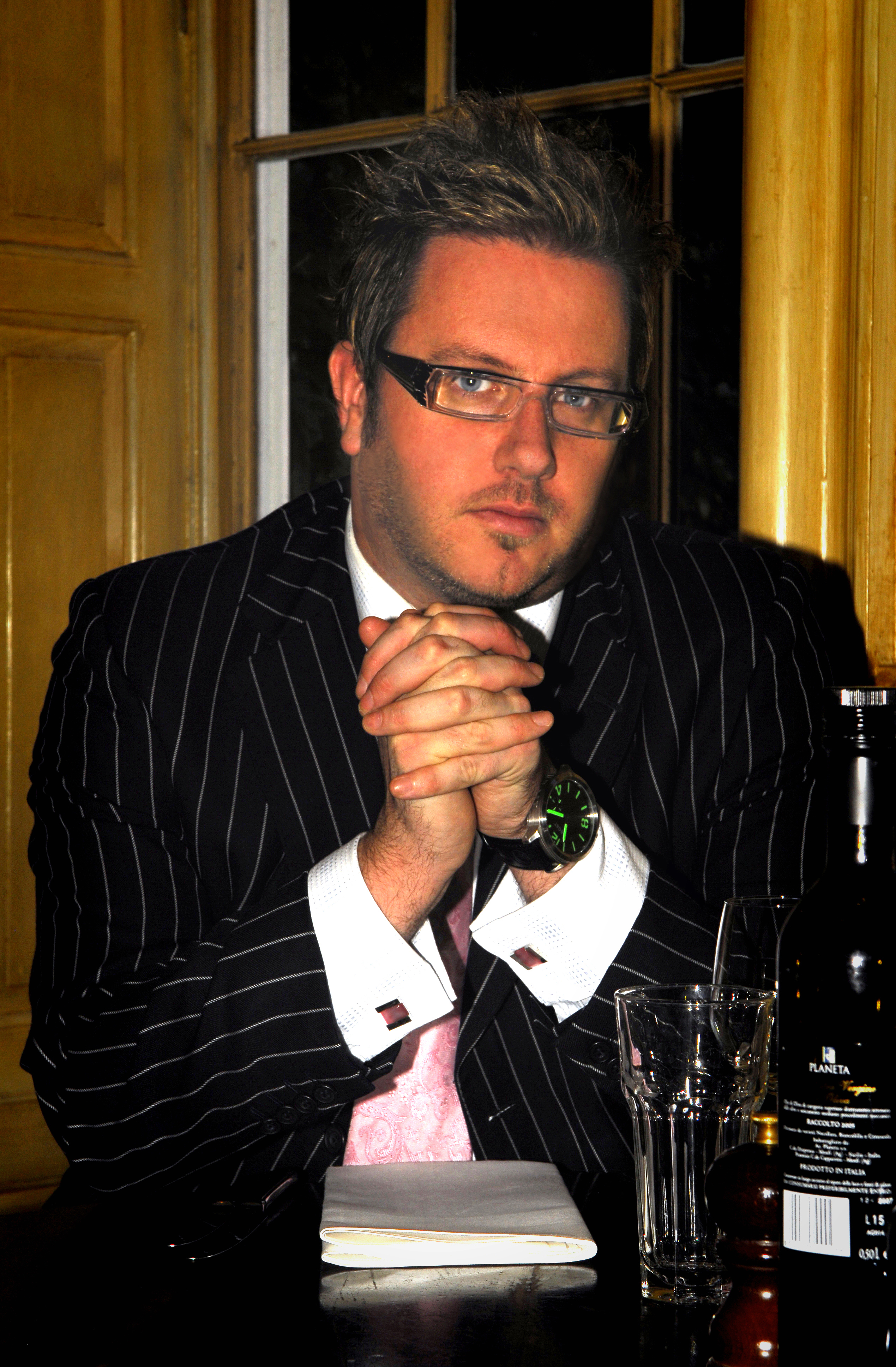 Matt O'Connor